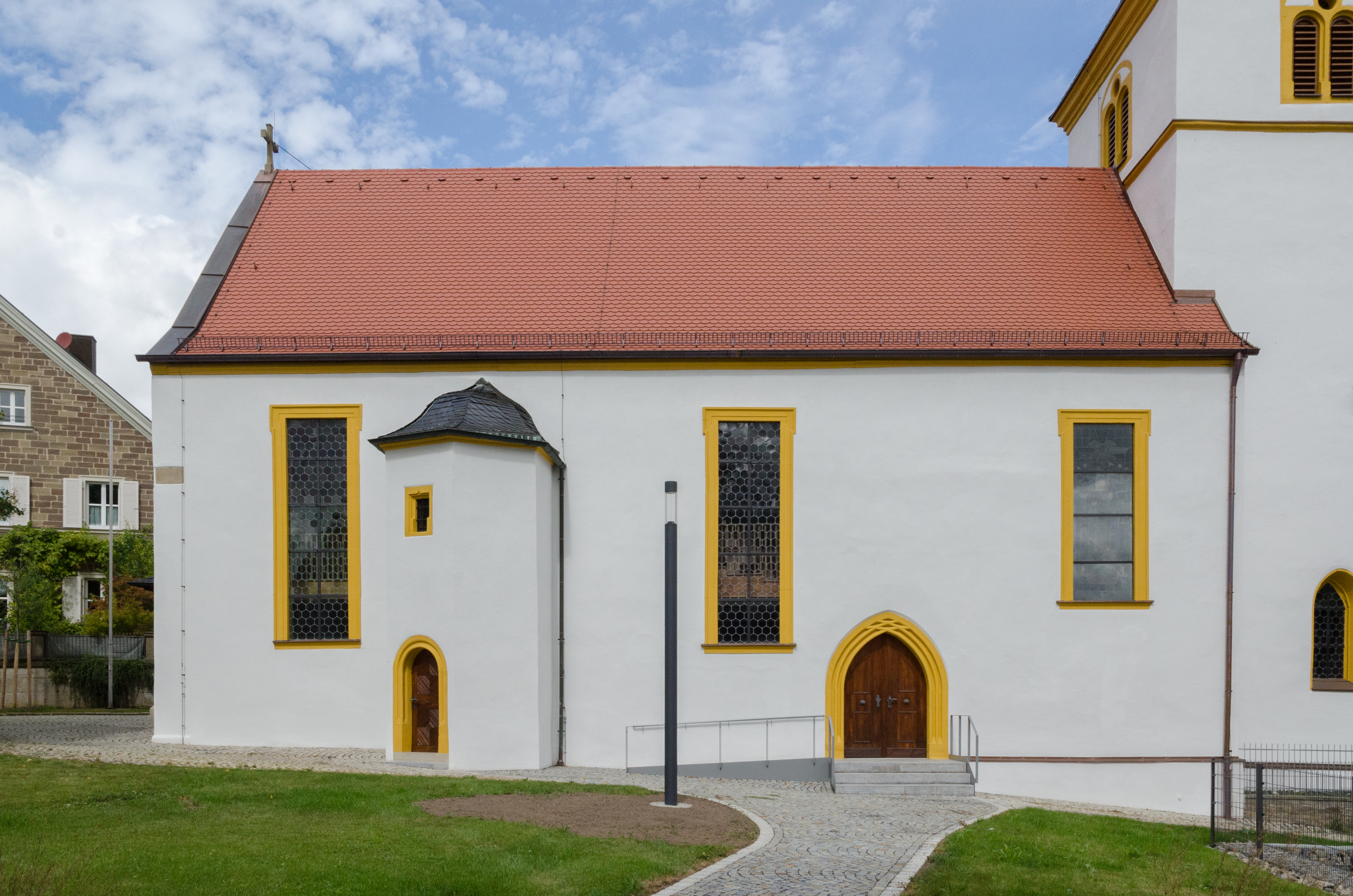 Maßbach, St. Barholomäus, Sep. 2013 nach der Außenrnovierung